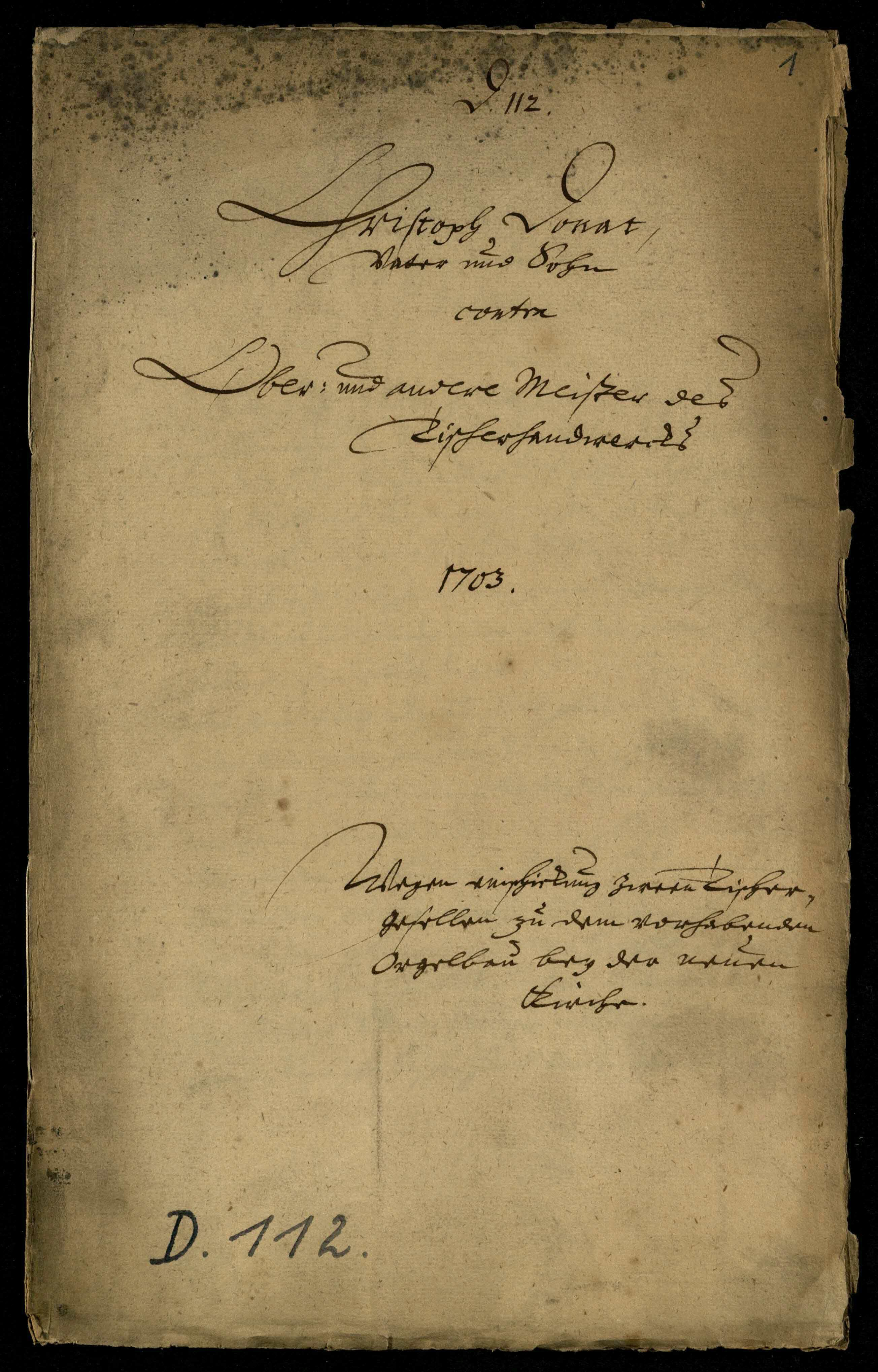 Die Orgelbauer Christoph Donat (Vater und Sohn) beschweren sich über die Tischler wegen Vorenthaltung zweier Gesellen zum Orgelbau in der Neukirche 1703